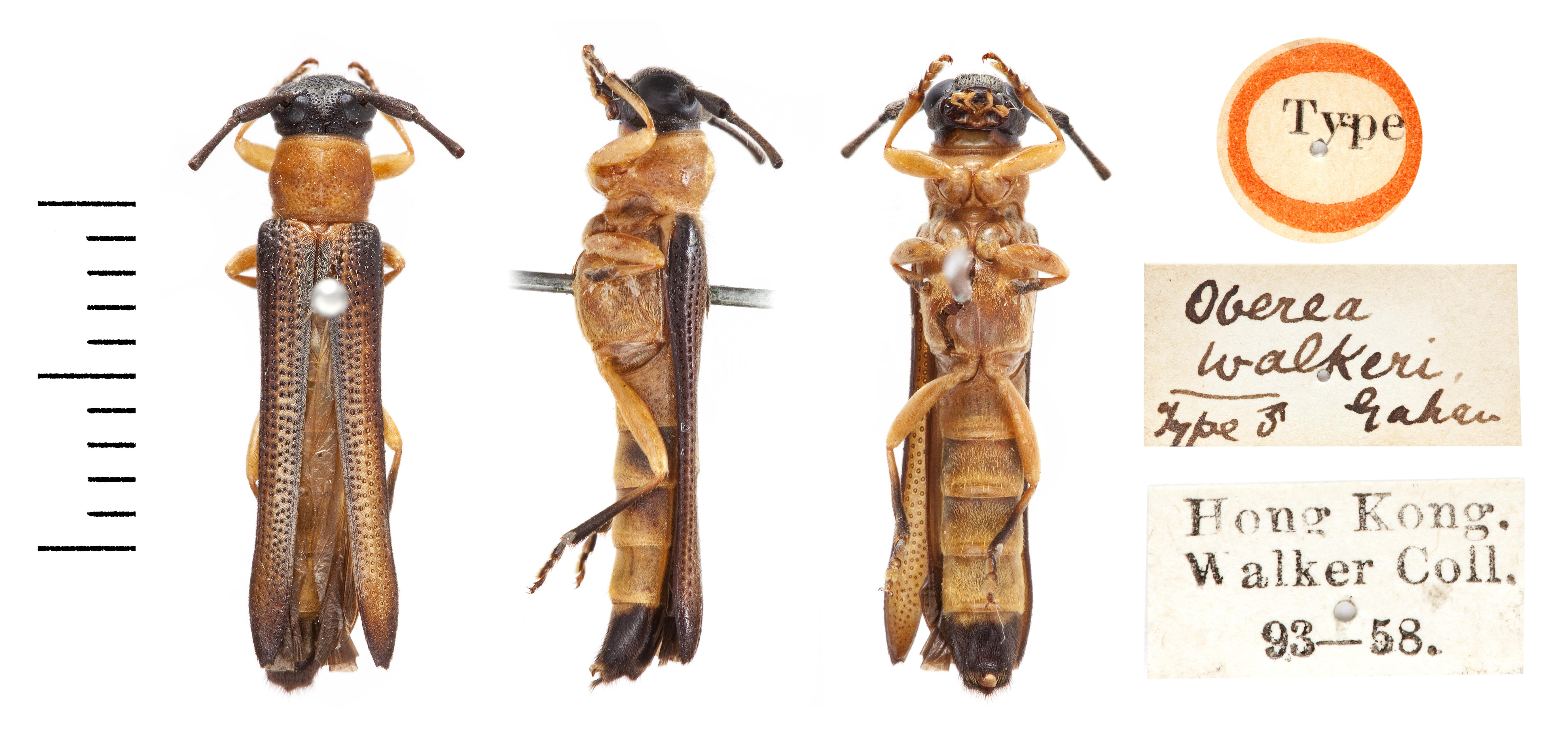 Oberea walkeri Gahan, 1894 Hong Kong. Walker Coll. 93-58. 7130_C BMNH_Oberea_walkeri_type Hong Kong. Walker Coll. 93-58. 7130_C BMNH_Oberea_walkeri_type